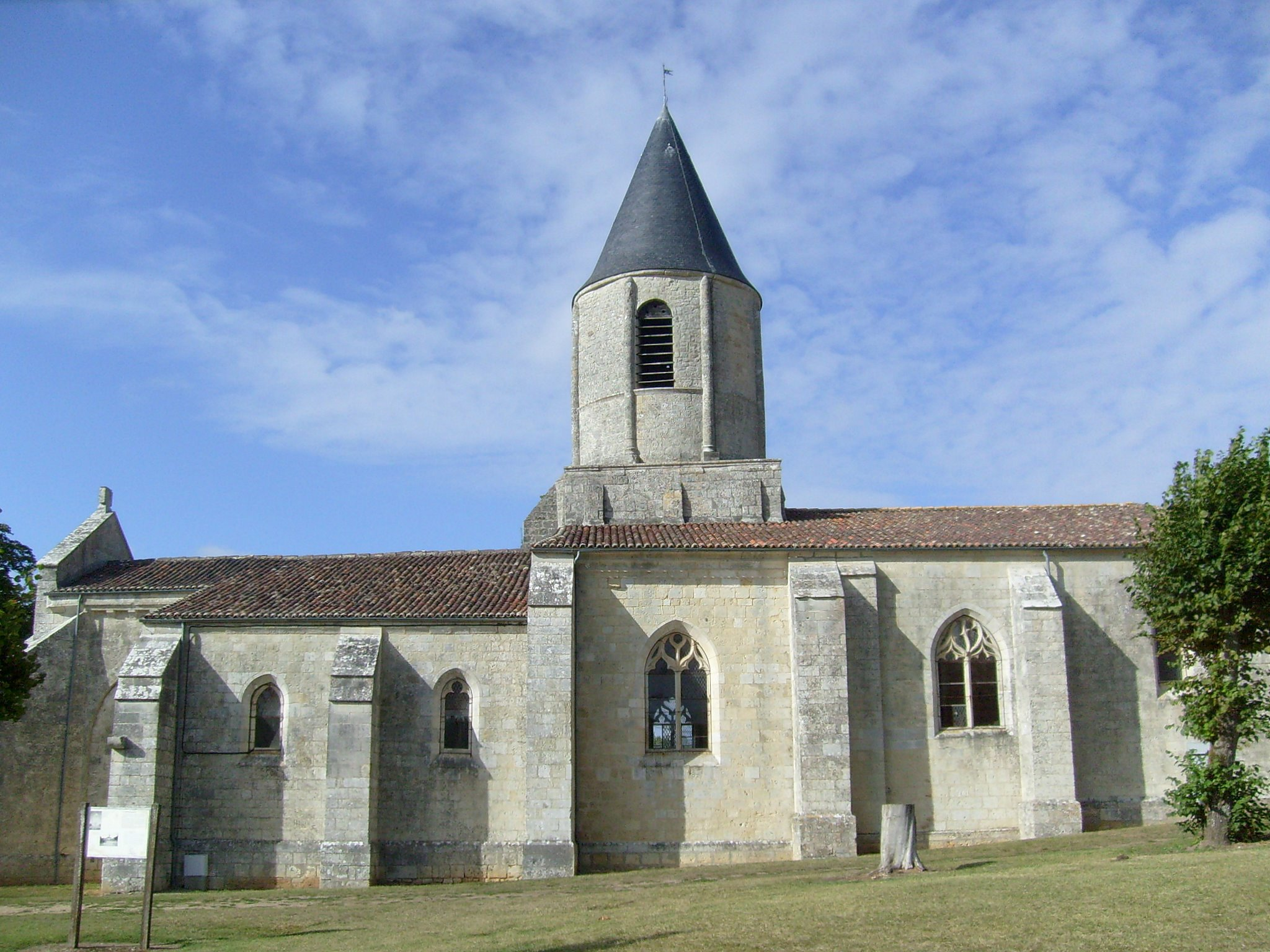 Eglise de Saint-Symphorien